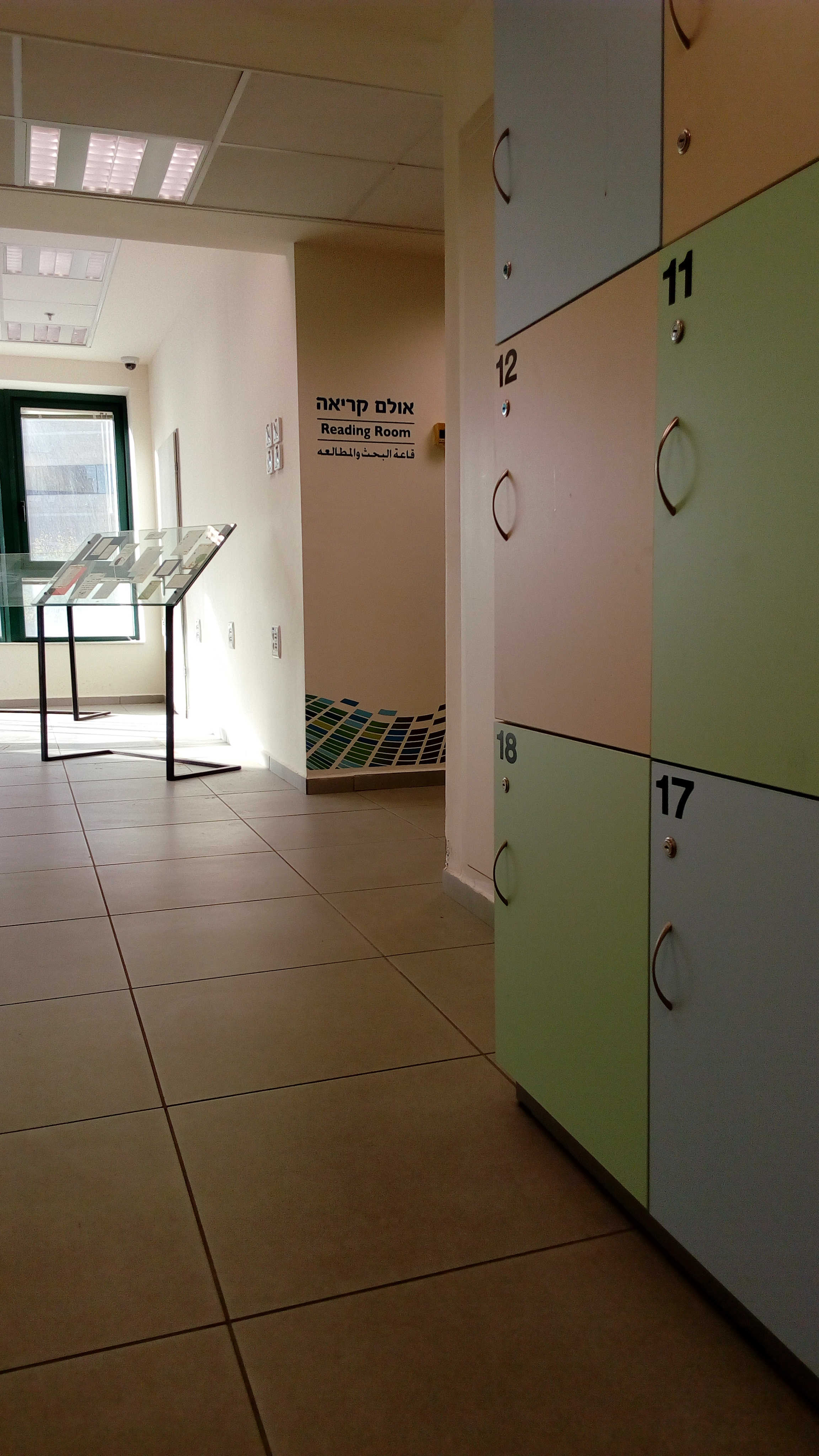 מבואה לאולם הקריאה